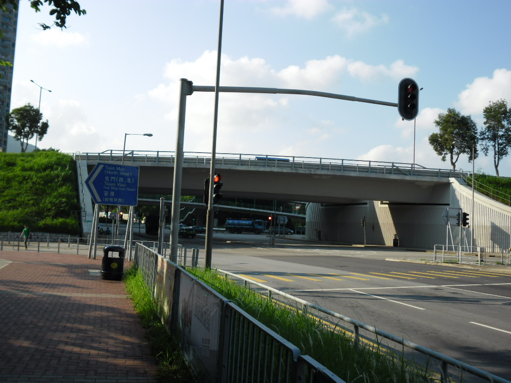 中文（香港）: 青田交匯處的橋橫跨震宸路上